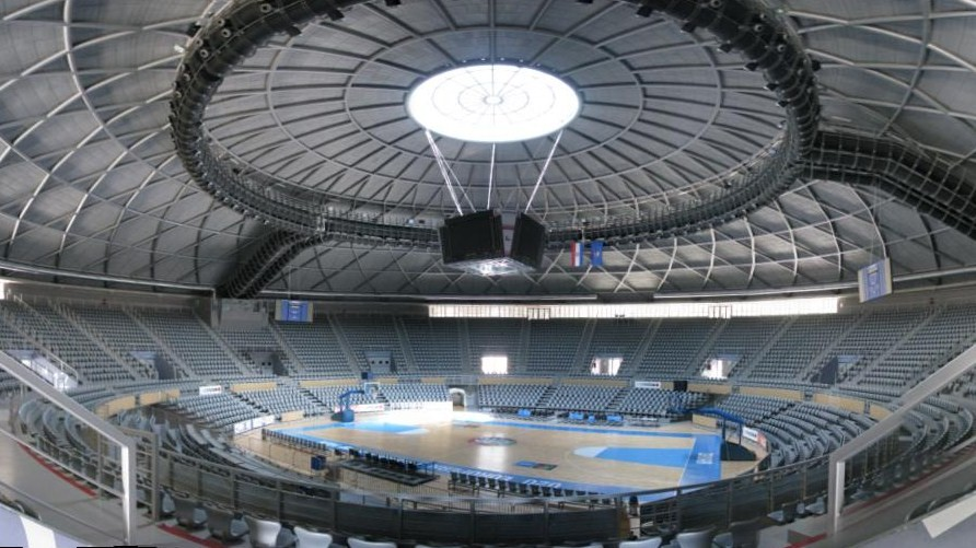 Dvorana Krešimira Ćosića Zadar